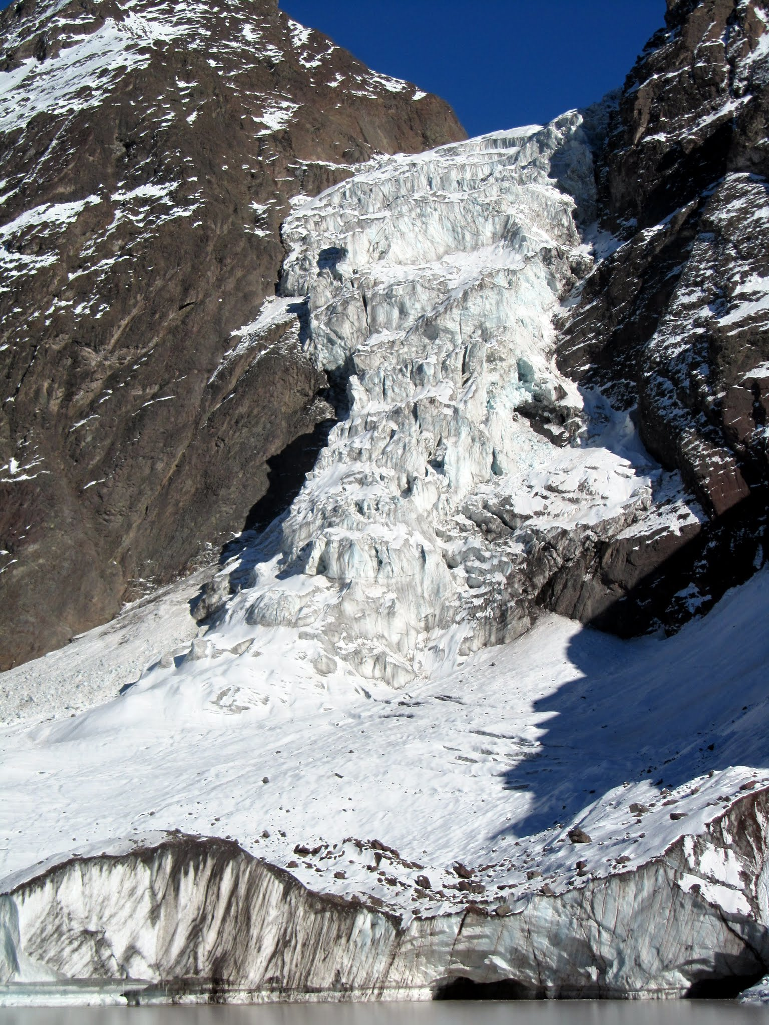 Glaciar colgante - Monumento natural El Morado